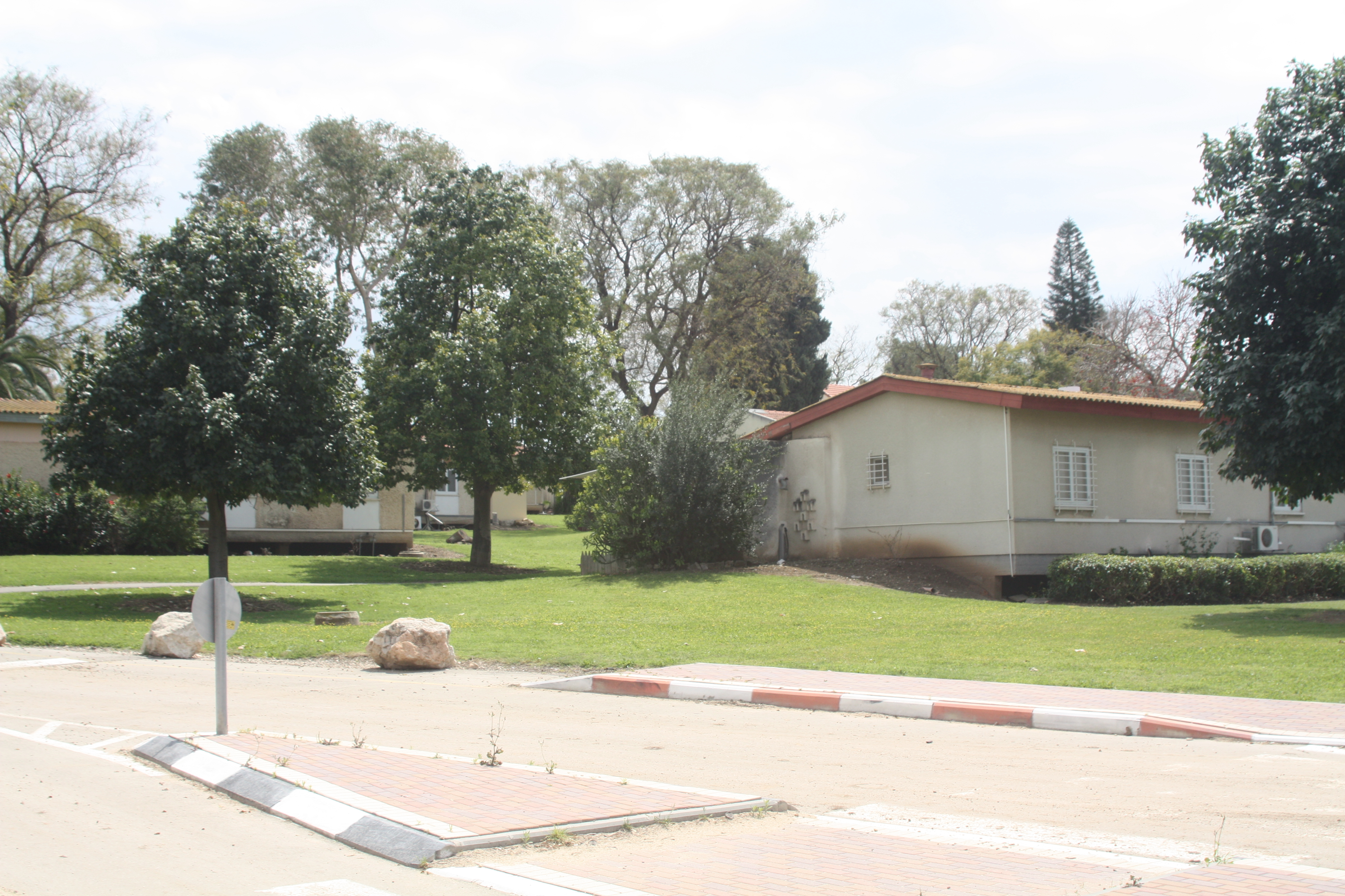 להבות חביבה Lehavot Haviva